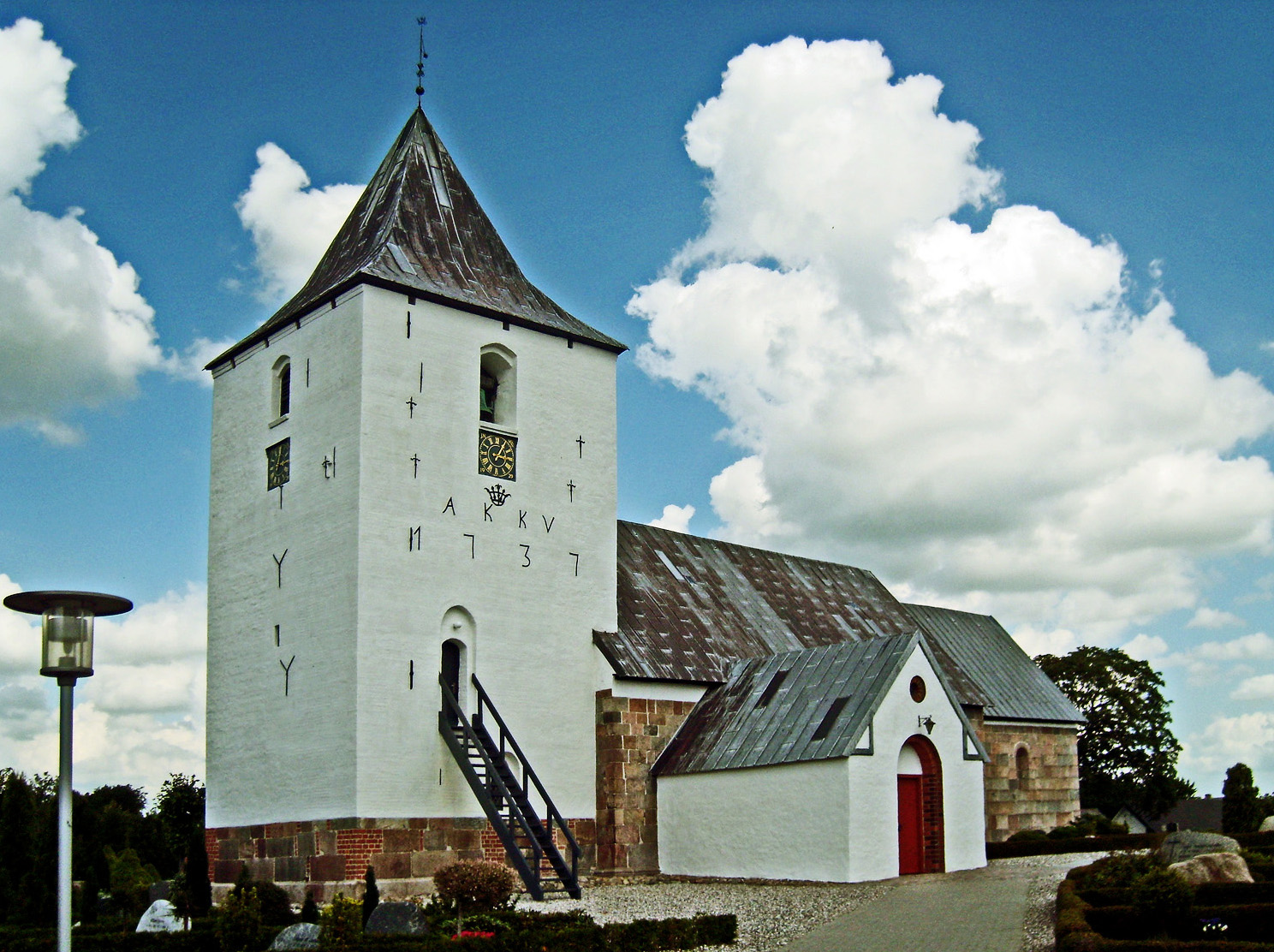 Skals kirke (Viborg) – fra sydvest